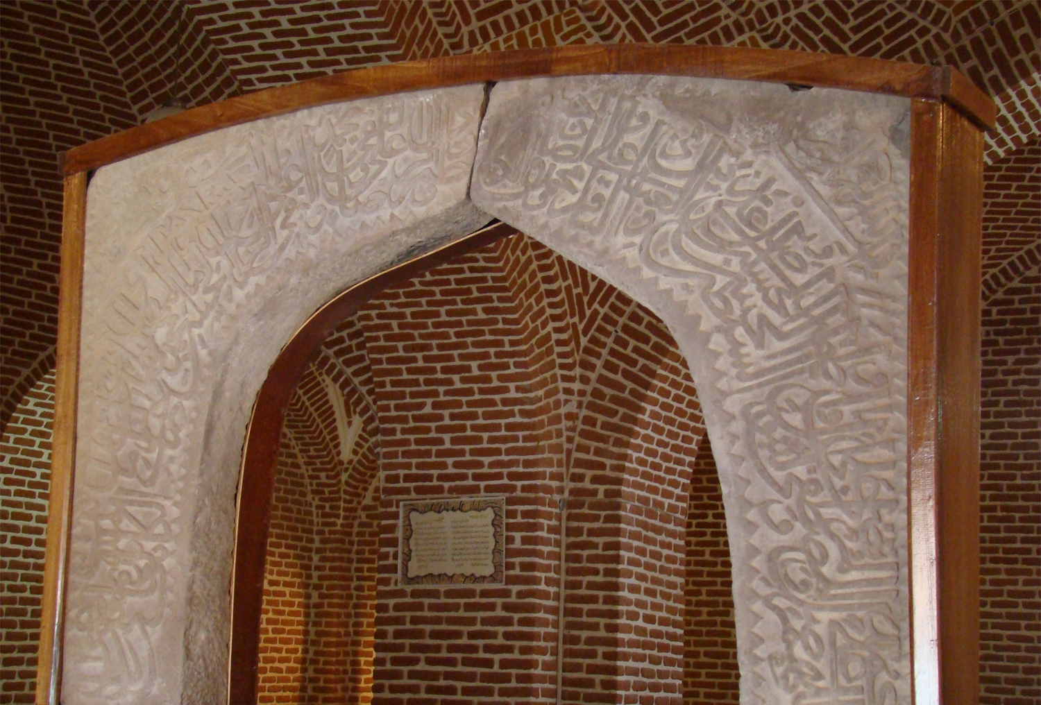 سنگ صلوات